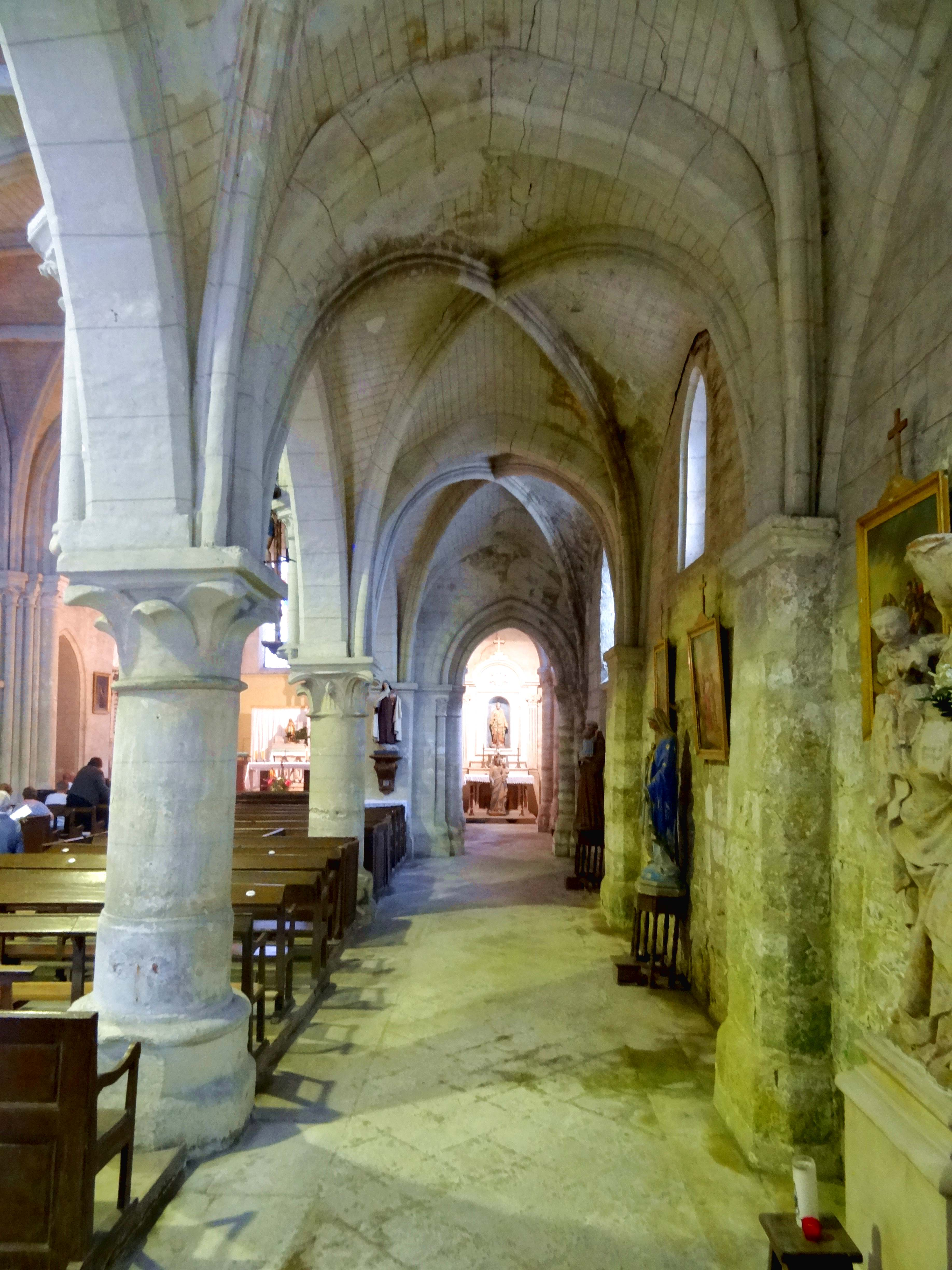 Intérieur de l'église - voir titre.